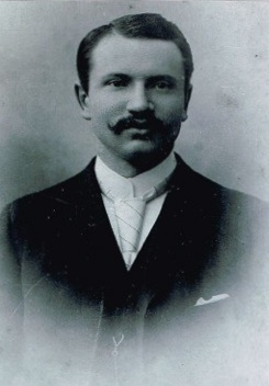 Porträtfotografie von Dr. phil. Karl Kippenberger (1868-1937)